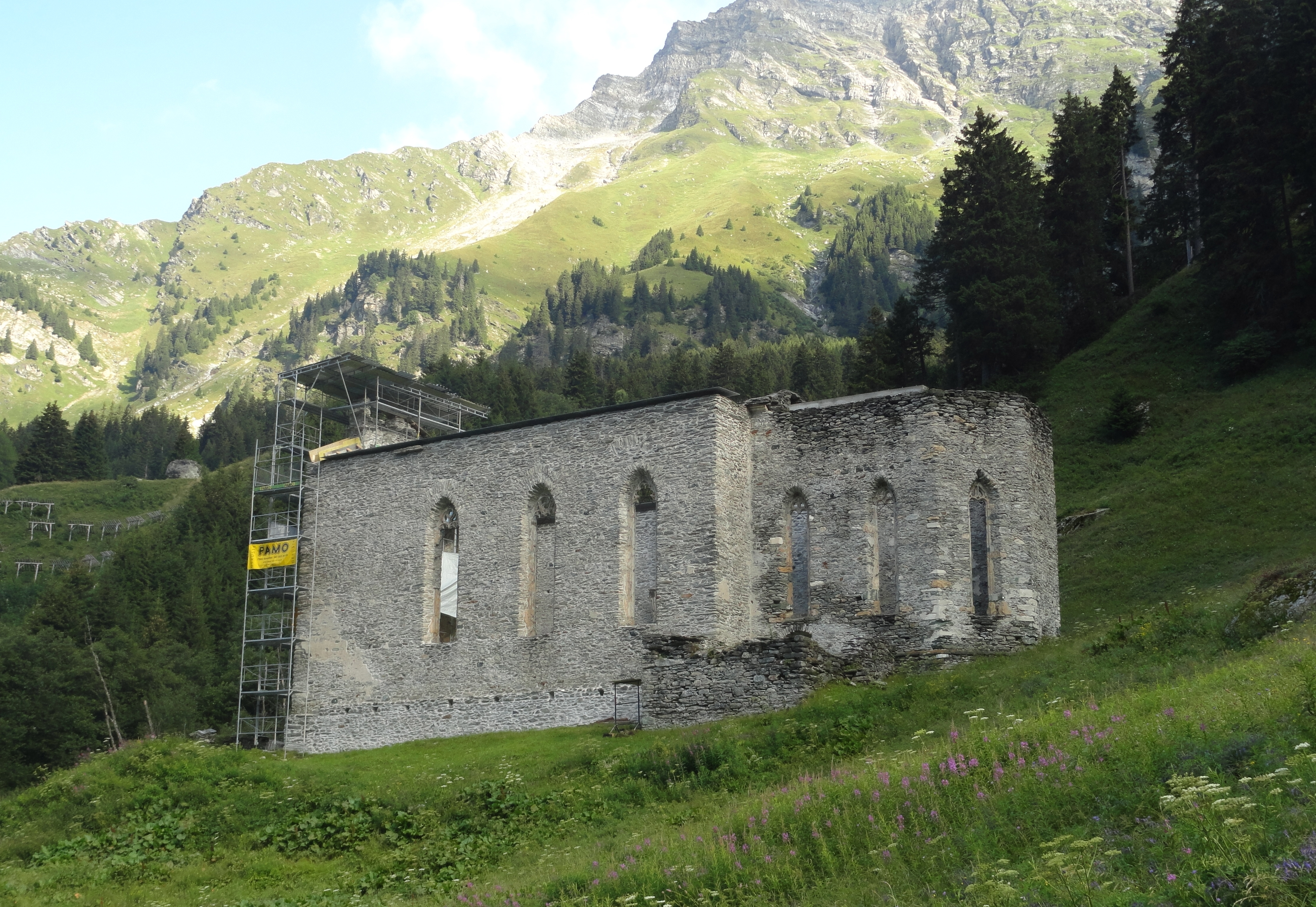 Kirchenruine San Gaudenzio Ansicht von Süden